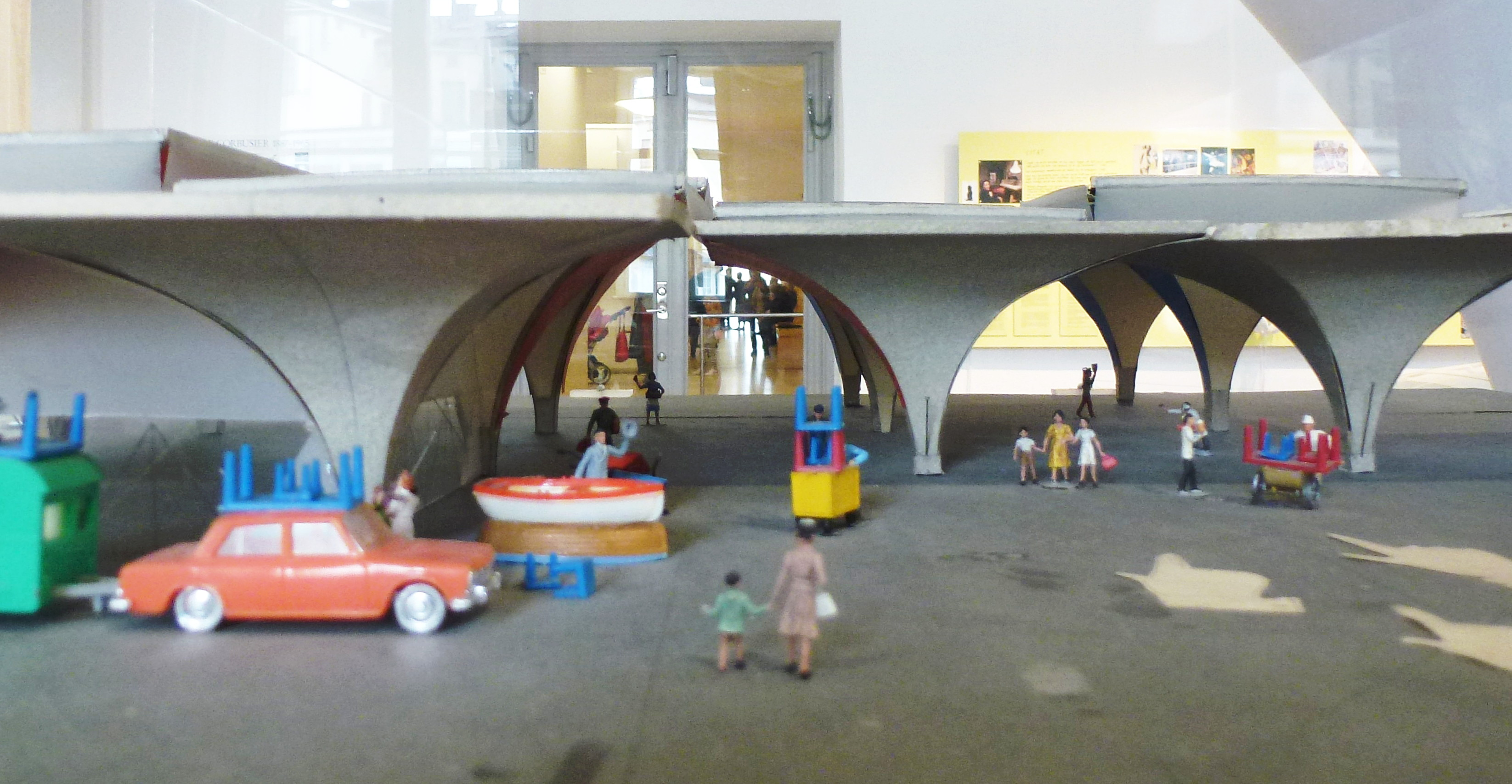 Léonie Geisendorf: NK stormarknad Fittja, modell